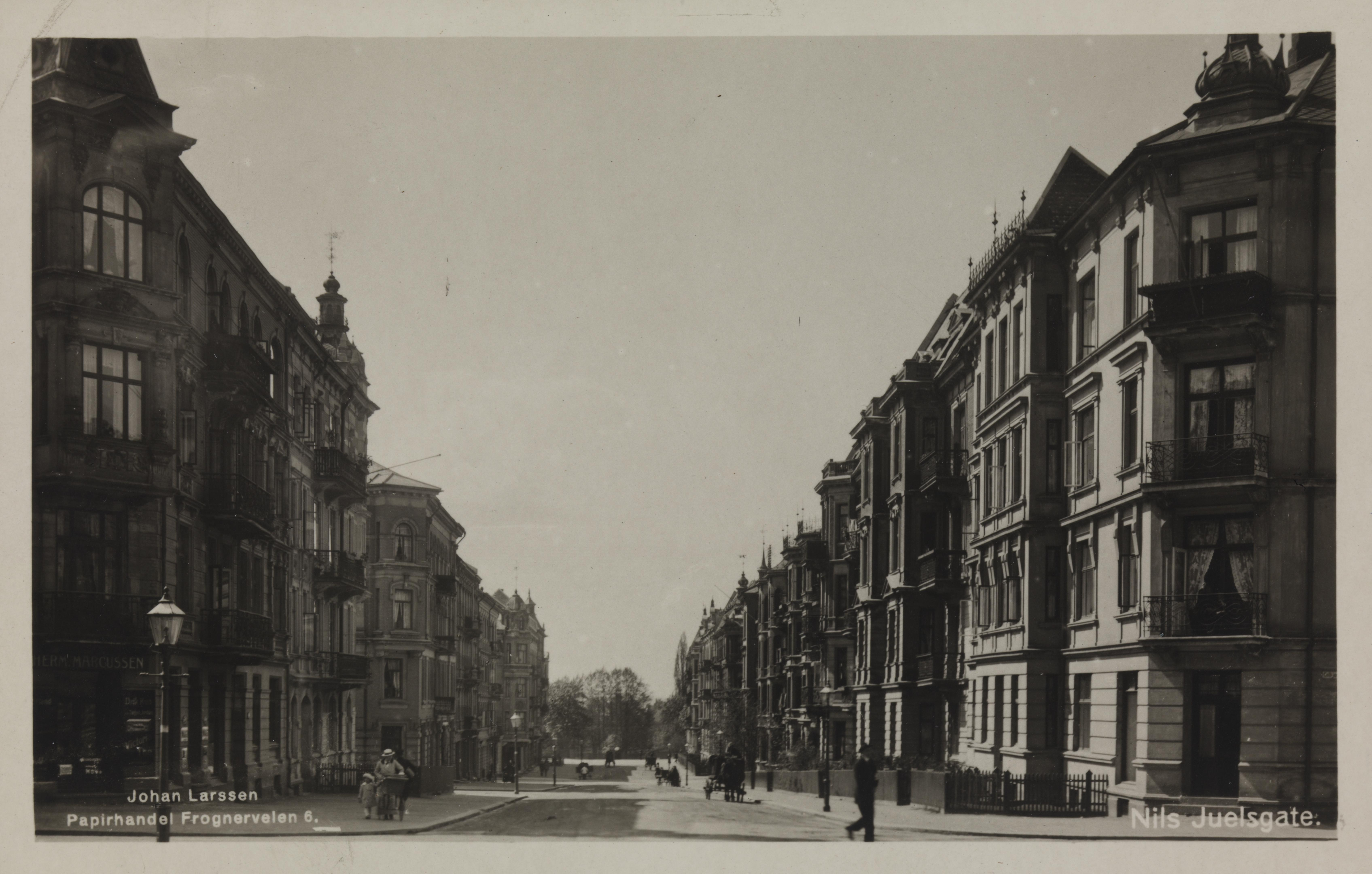 Bildet er hentet fra Nasjonalbibliotekets bildesamling: Frogner,Niels Juels gate, Oslo. Bildet er tatt sørvestover fra krysset ved Colbjørnsens gate.